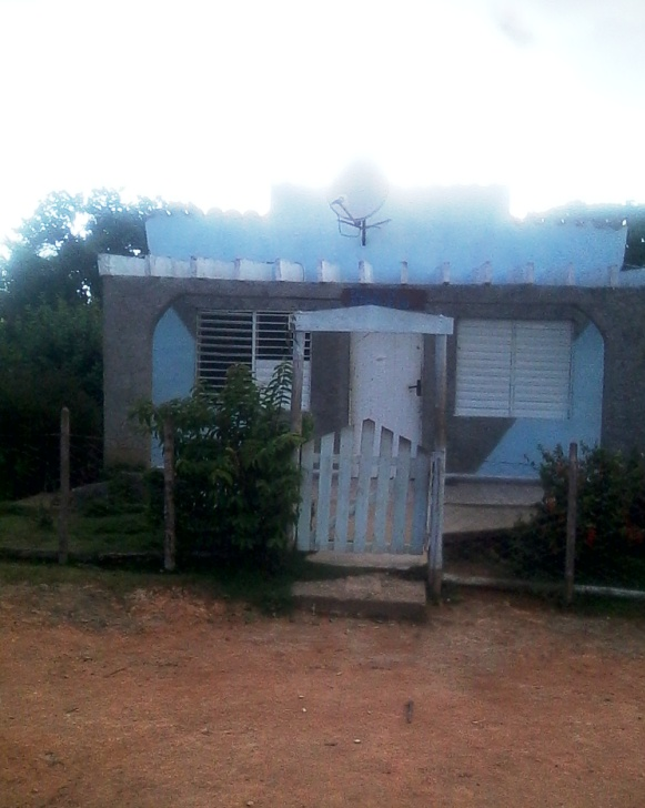 Sala de tv de la comunidad de Alegría de Pio